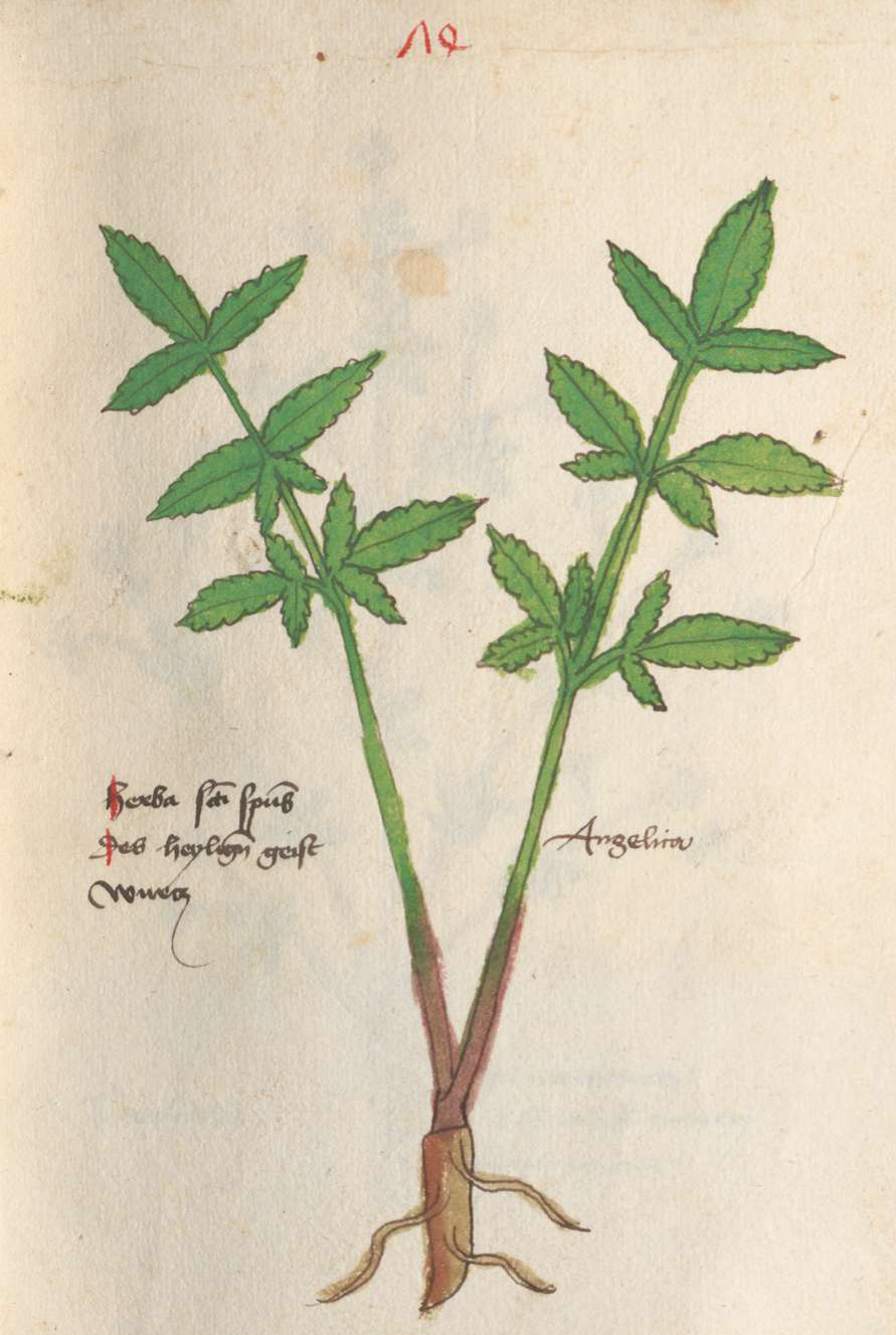 Abbildung der Engelwurz